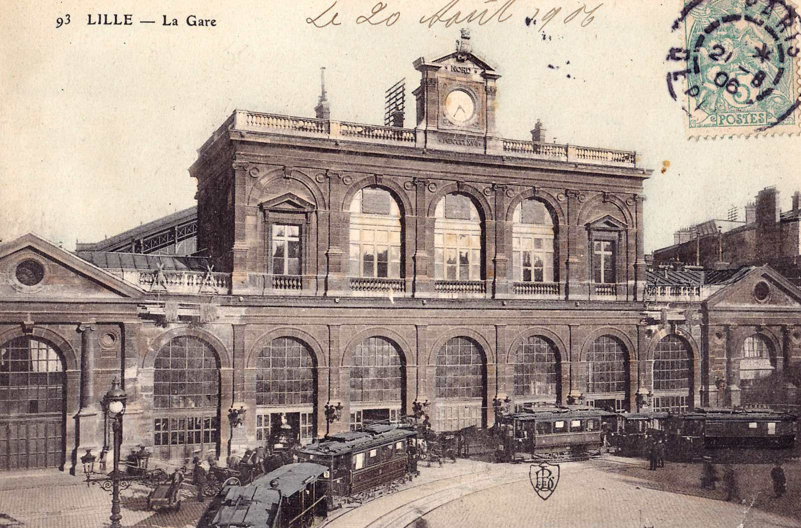 Carte postale ancienne éditée par LB, n°93 :LILLE - La Gare